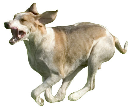 Grand anglo-francais orange sur fond balnc